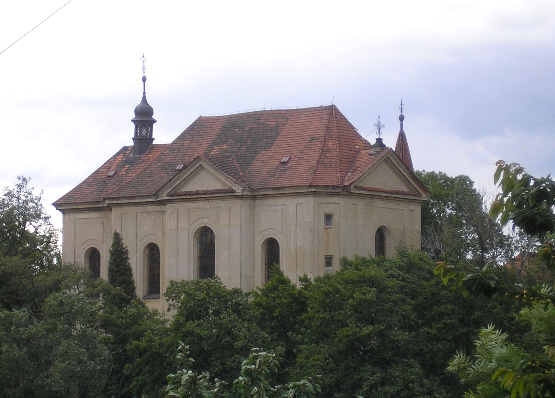 Pohled na kostel v Zápech